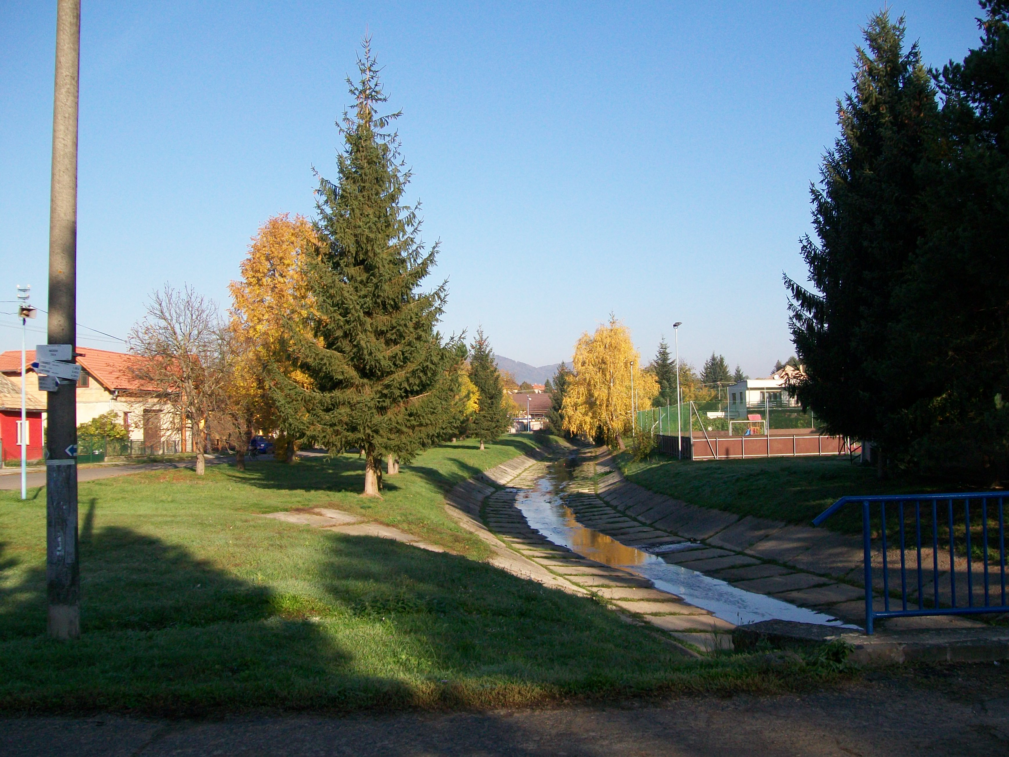 Potok Mašková pretekajúci obcou Mašková v okrese Lučenec